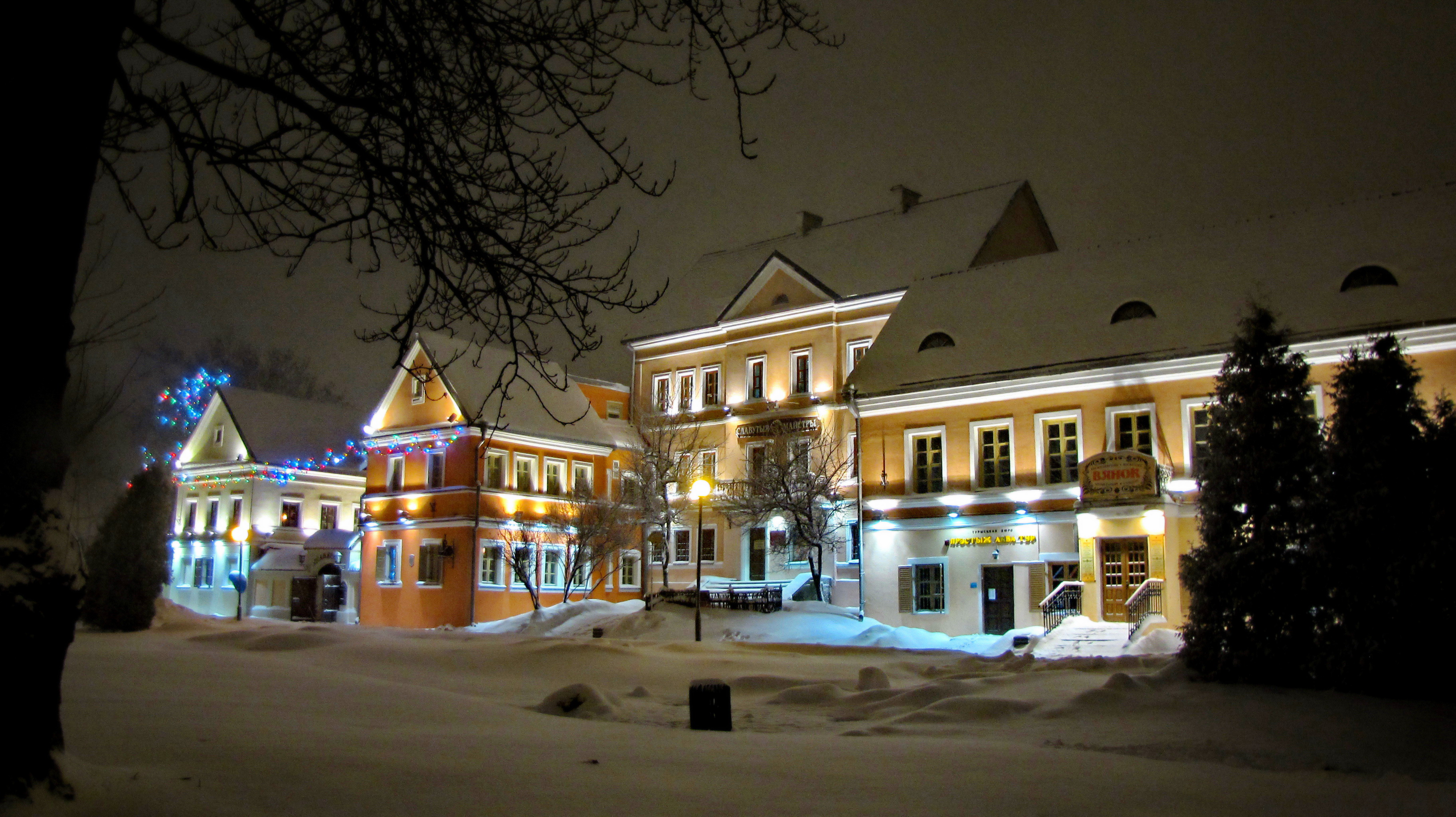 Беларуская (тарашкевіца): Гістарычны цэнтар г. Менску: будынкі і збудаваньні, пляніровачная структура, ляндшафт і культурны пласт. г. Менск This is a photo of Belarusian heritage monument. Reference number: 711Е000001 ( WLM)